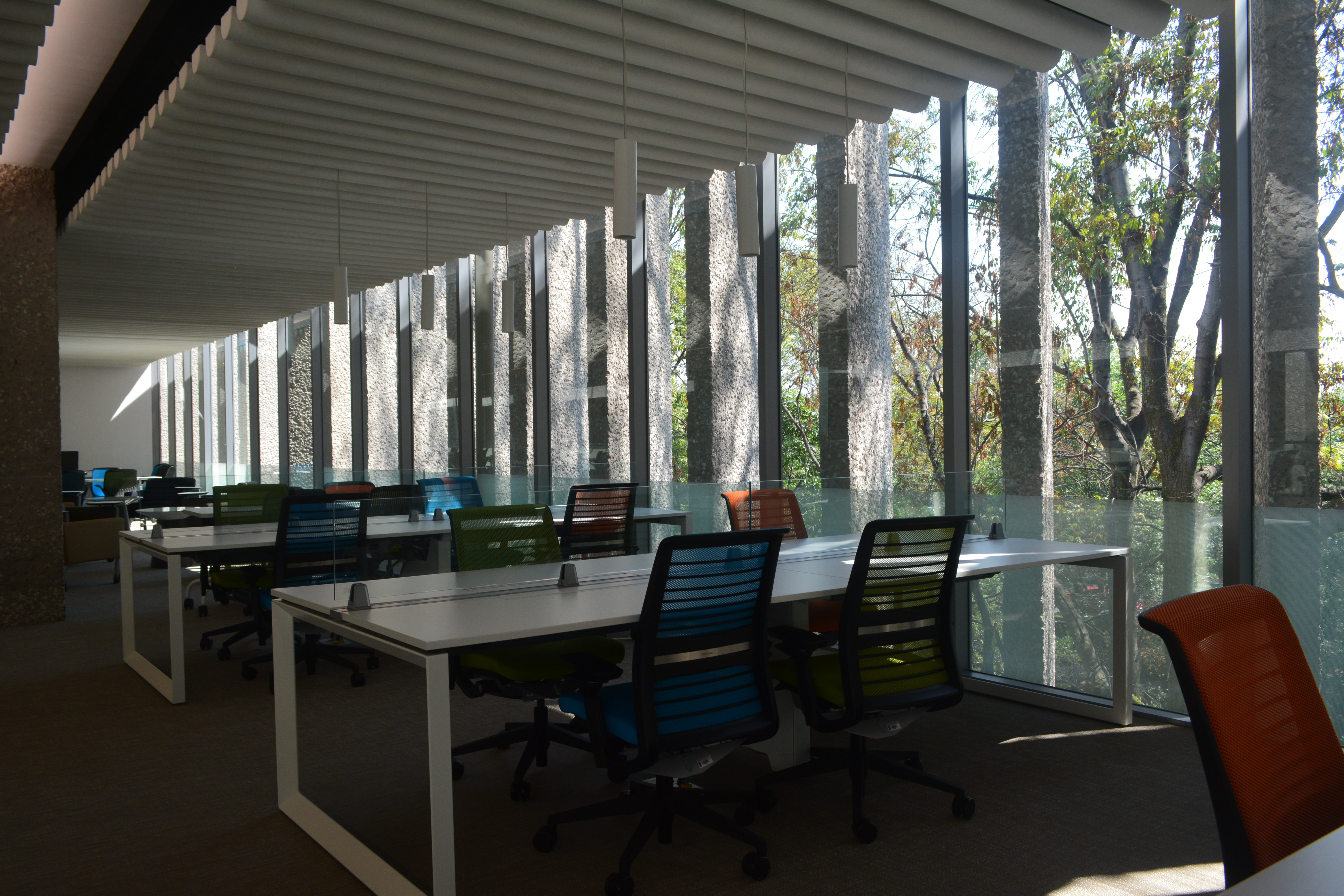 Mesas de trabajo en el edificio Mario Ojeda, anexo a la BDCV